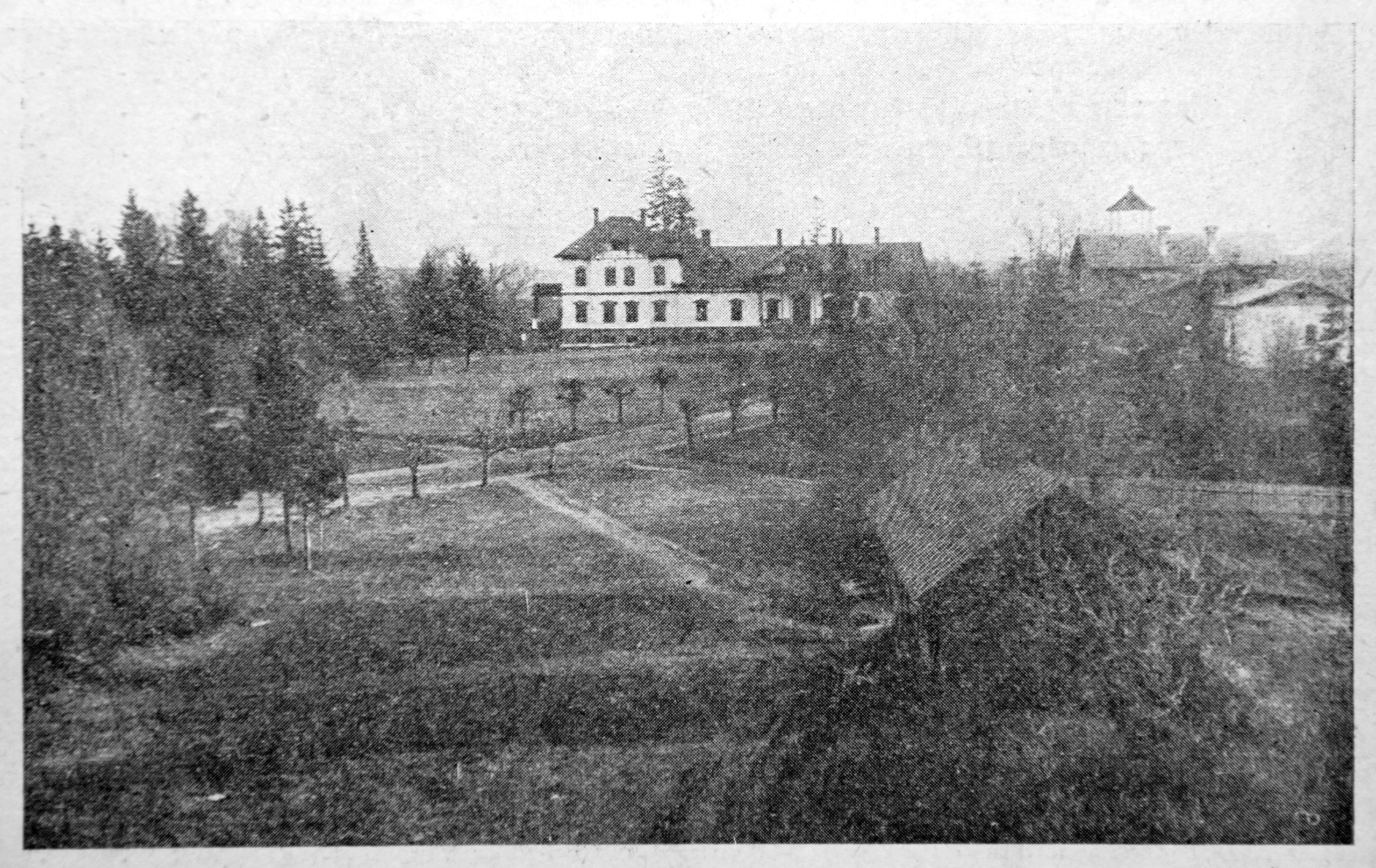 Беларуская (тарашкевіца): Менск (Miensk), Лошыца (Łošyca). Сядзіба Прушынскіх